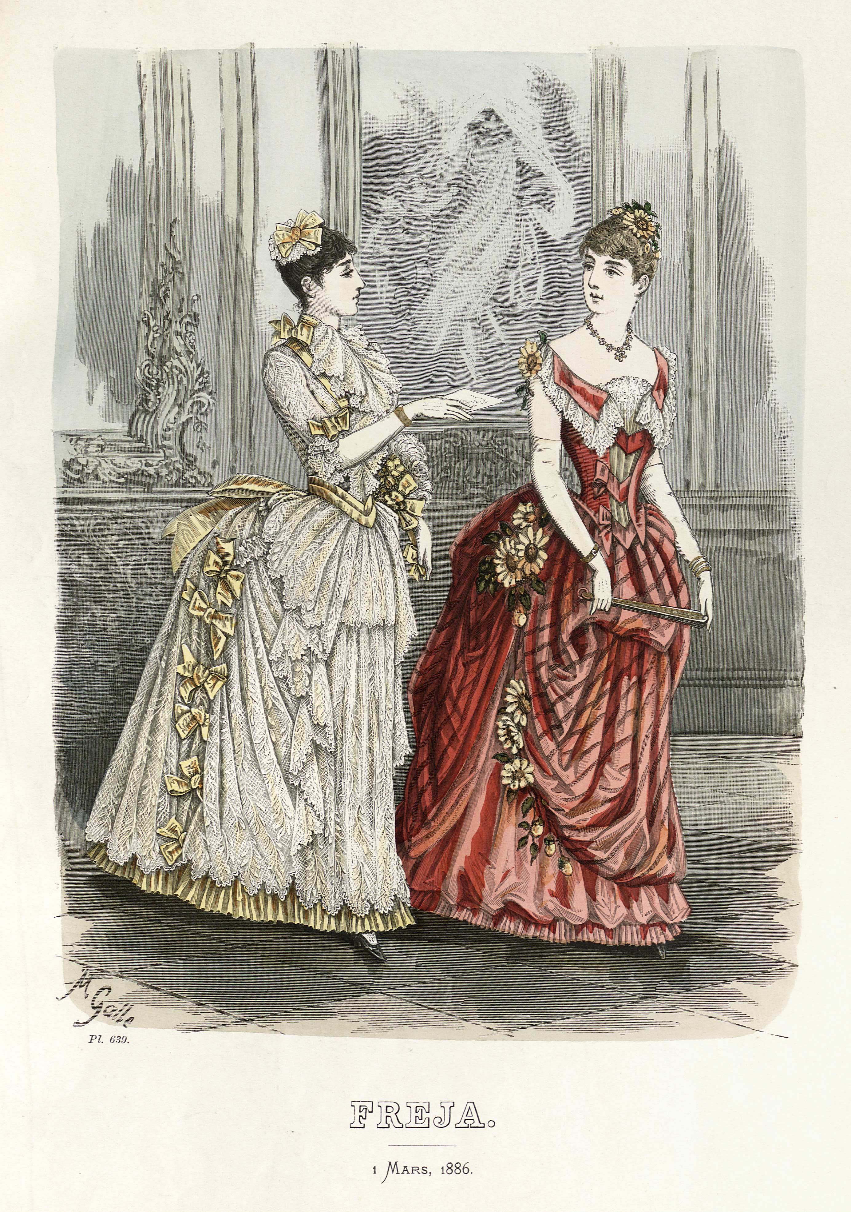 Bal; Dans; Balklänning; Klänning; Spets; Band; Frisyr; Blommor; Solfjäder